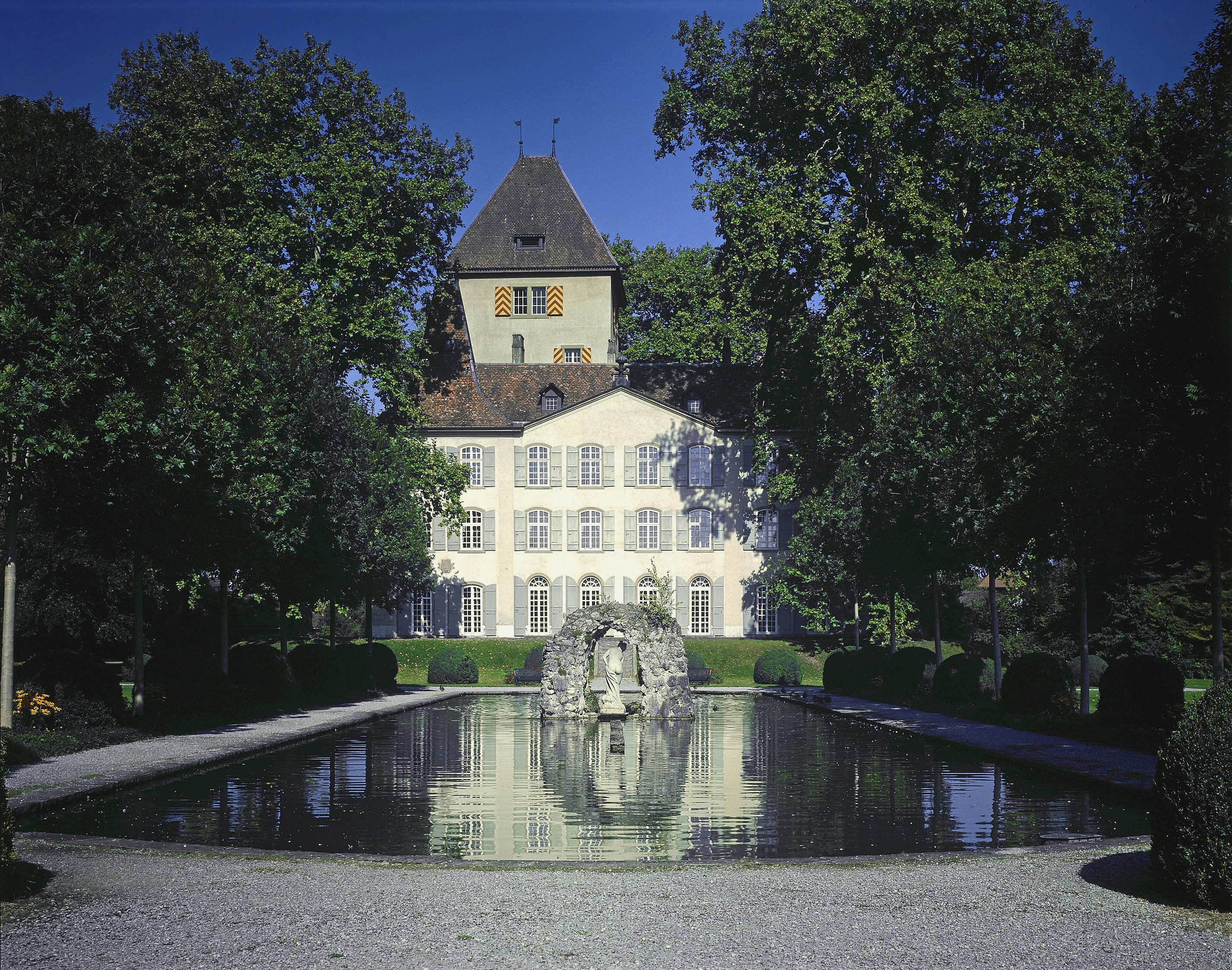 Schloss Jegenstorf von Süden.